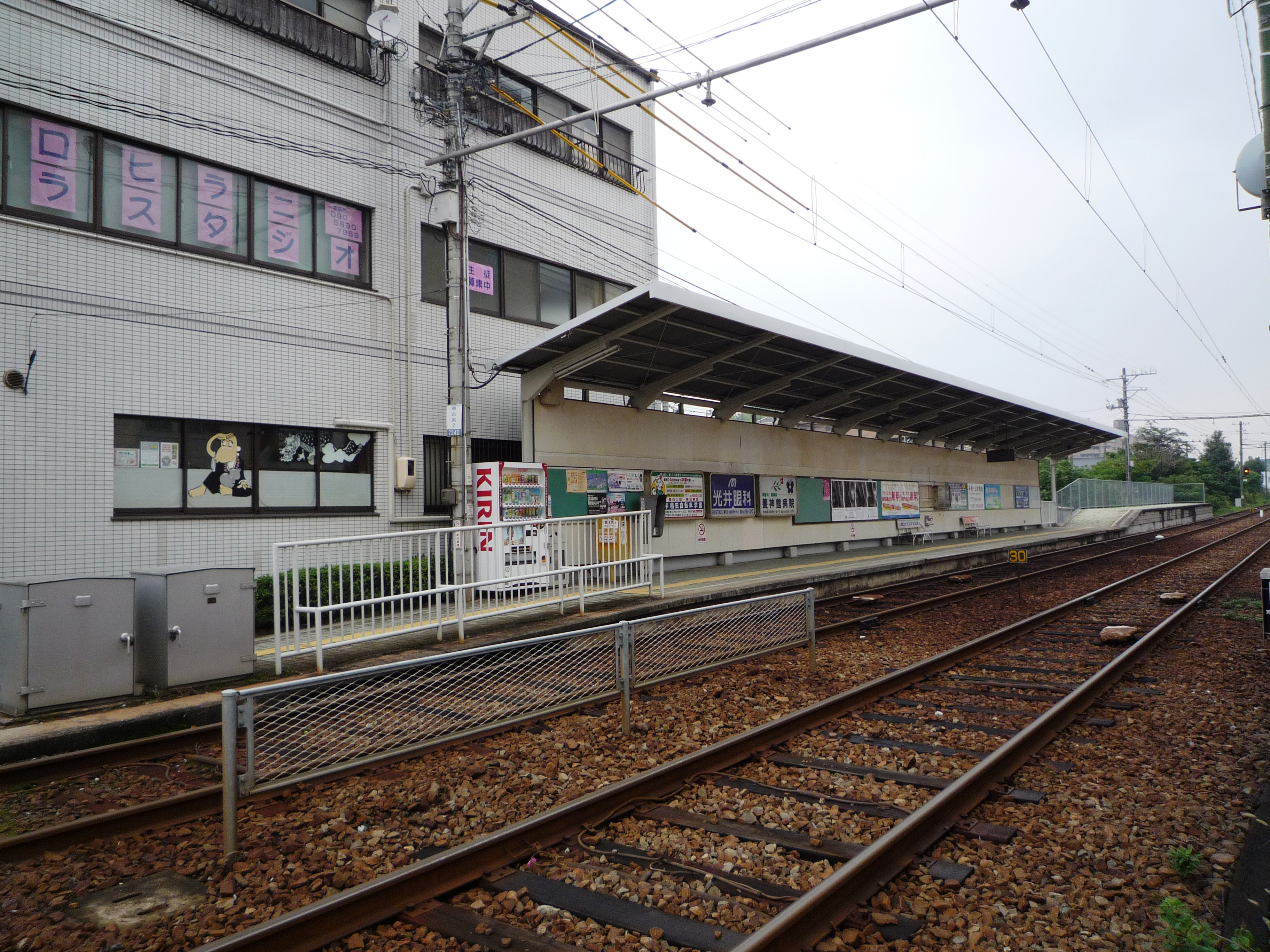 佐伯区役所前駅